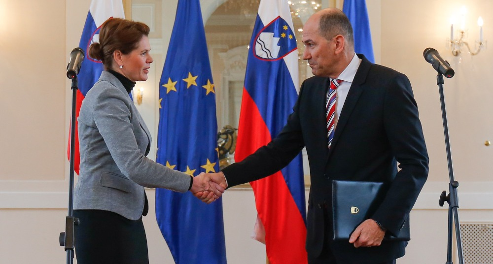 Primopredaja poslov med Alenko Bratušek in Janezom Janšo